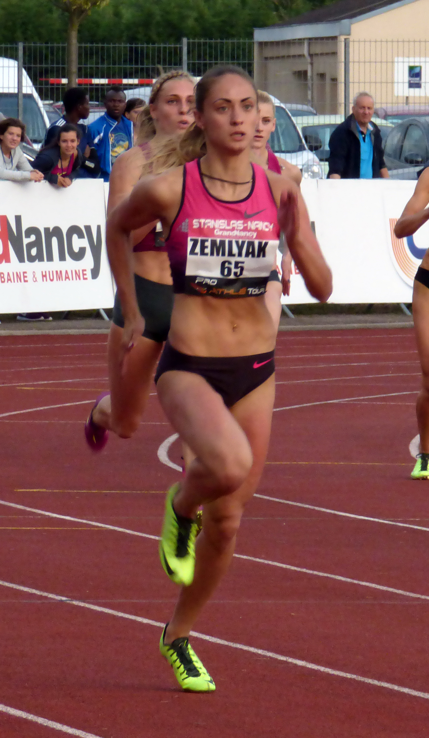 LNA meeting athlétisme 2014 stade marcel picot /zemlyak